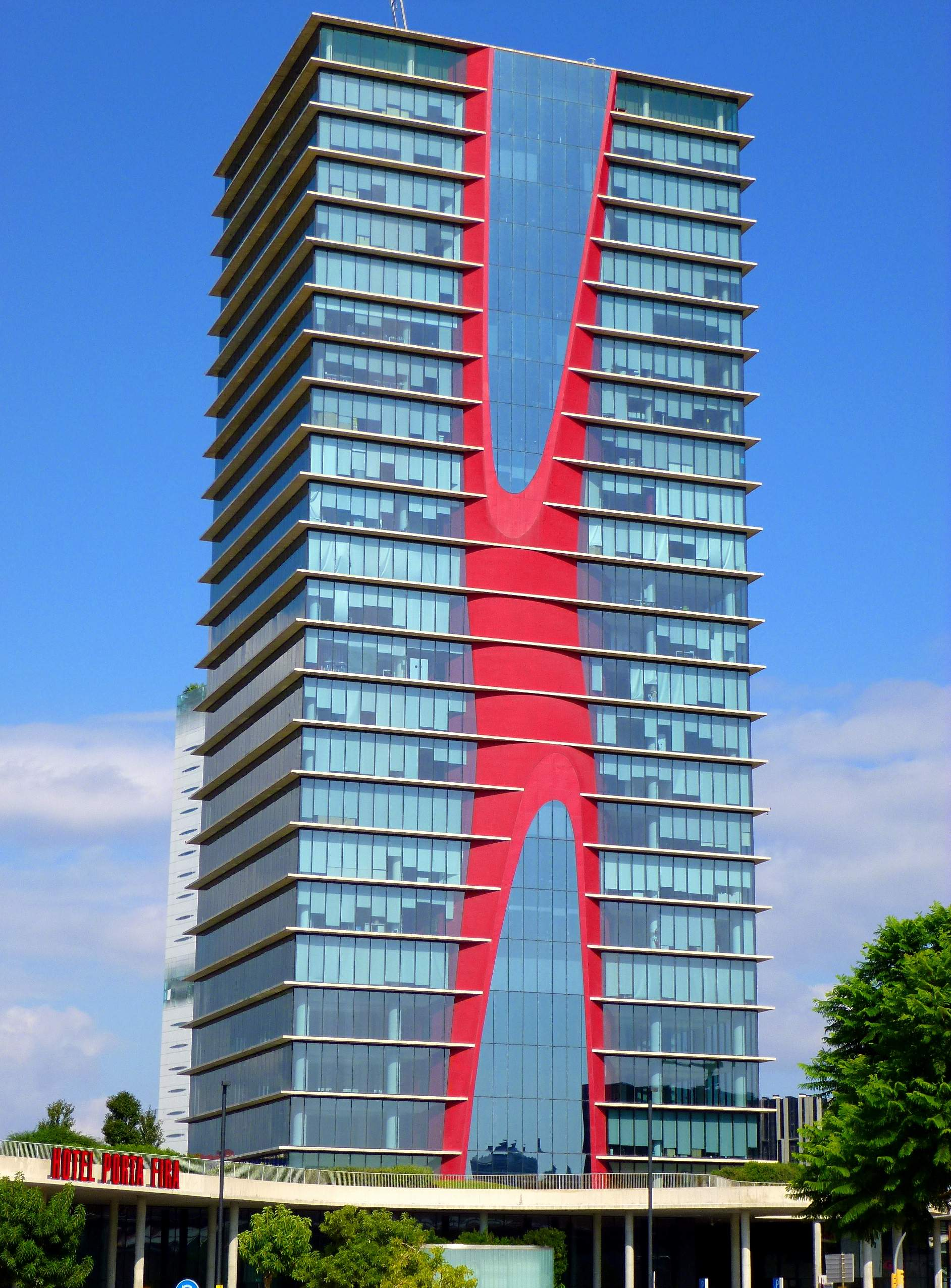 Torre Realia BCN, conocida como Torres Porta Fira, o Torres de Toyo Ito, junto con el próximo Hotel Porta Fira, en Hospitalet de Llobregat (Barcelona)